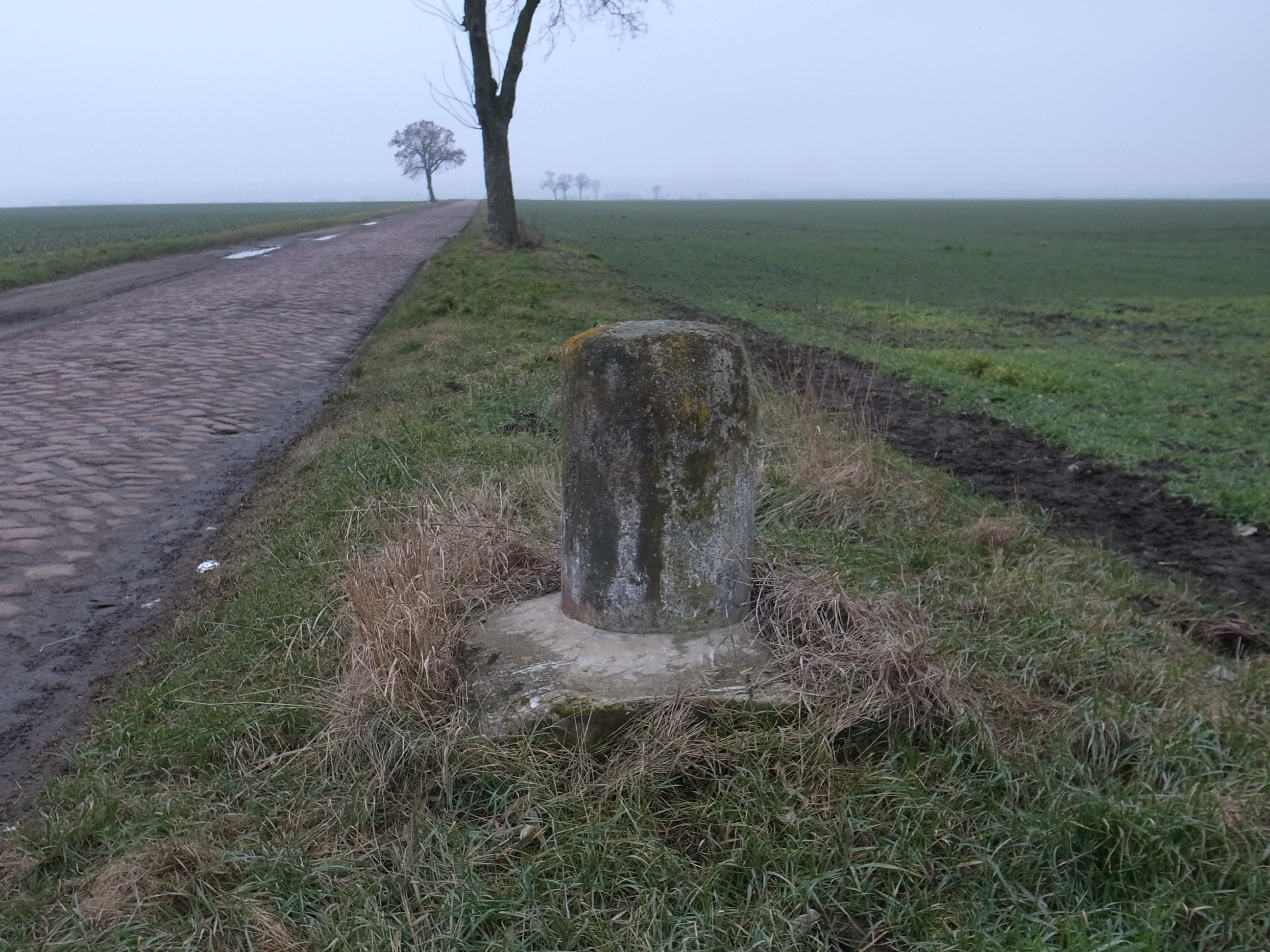 Piethen, Meilenstein, Anhaltischer Rundsockelstein